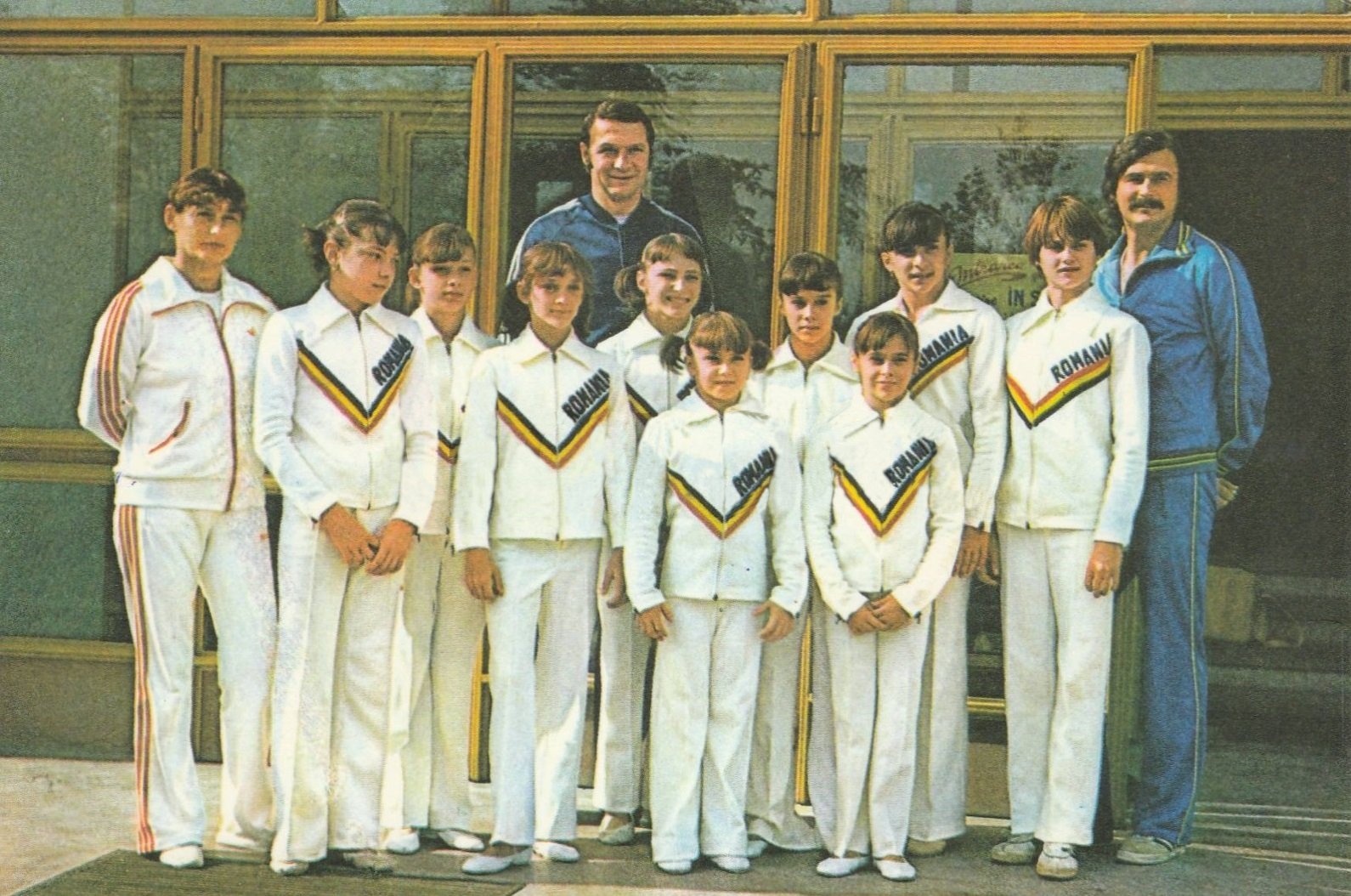 Lotul olimpic feminin de gimnastică al Republicii Socialiste România.